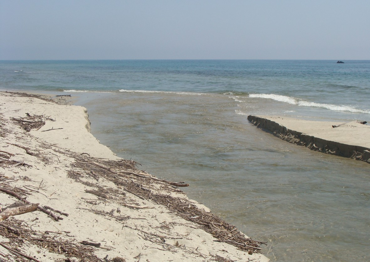 L'embouchure de l'Abatesco : le léger courant descendant est contrarié par de petites vagues. Noter le contraste de couleur des eaux, le fleuve étant chargé d'alluvions.